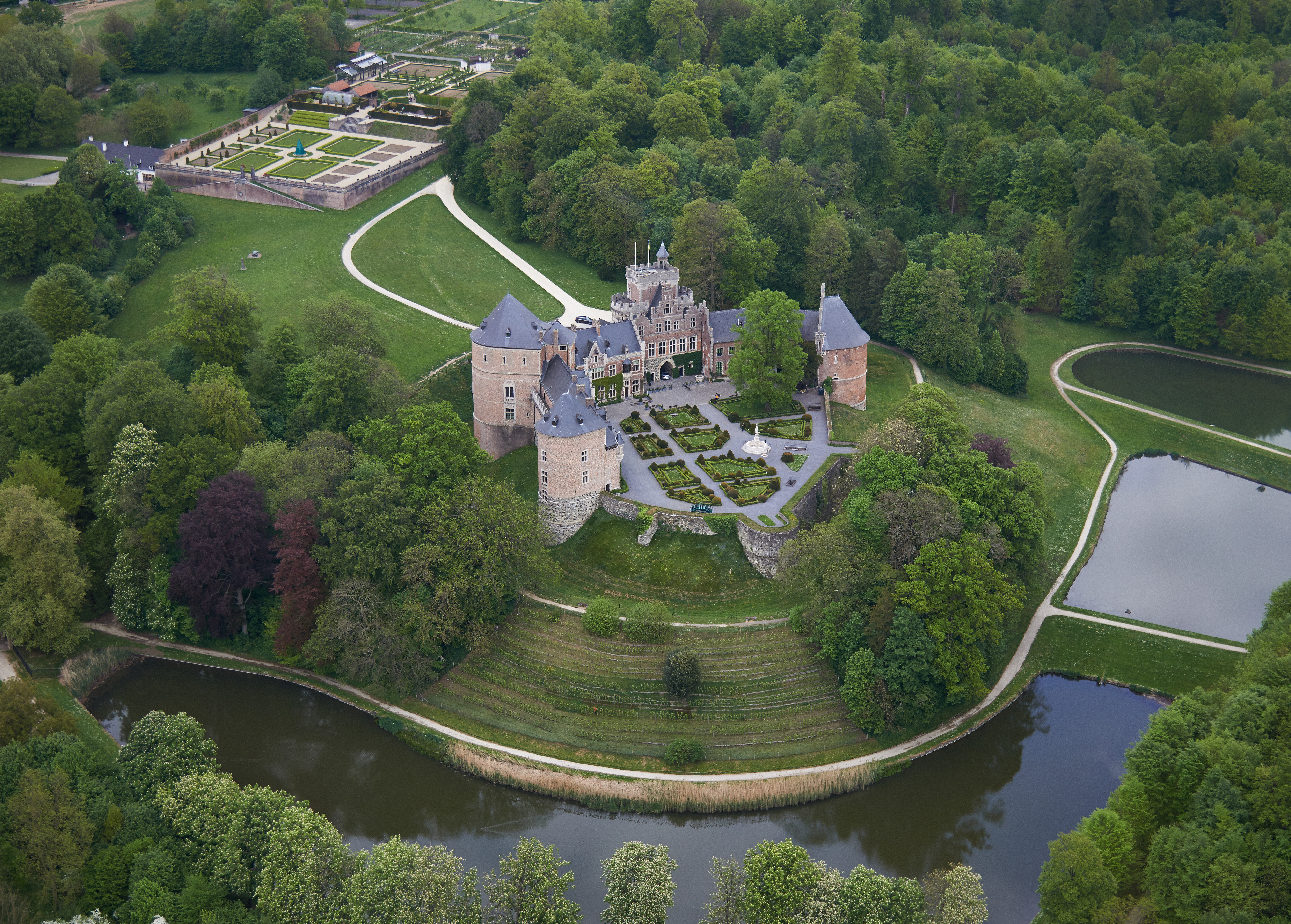 Luchtfoto van het kasteel van Gaasbeek, België